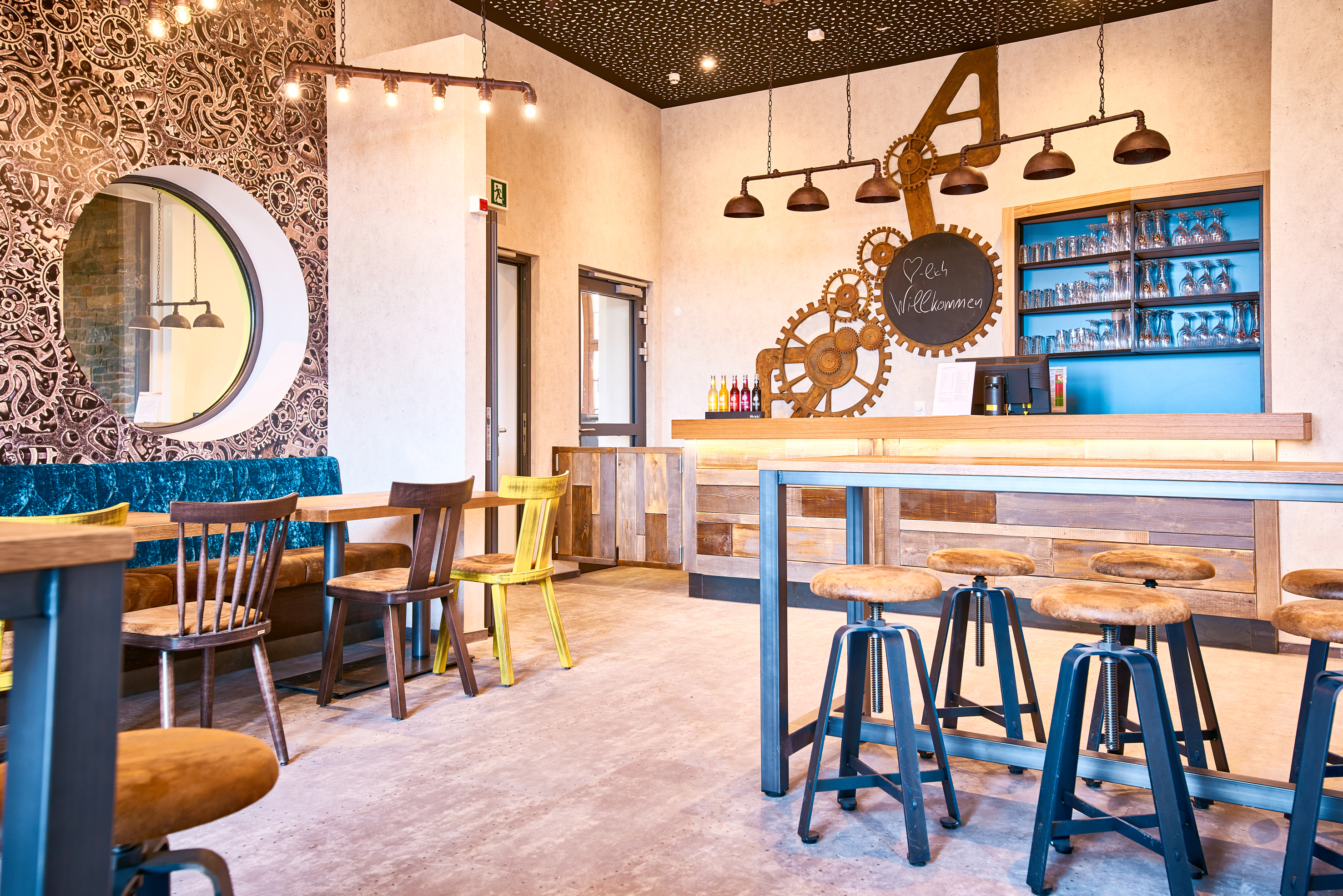 Modernisierter Aufenthaltsraum in der DJH Jugendherberge in der Wewelsburg bei Paderborn.